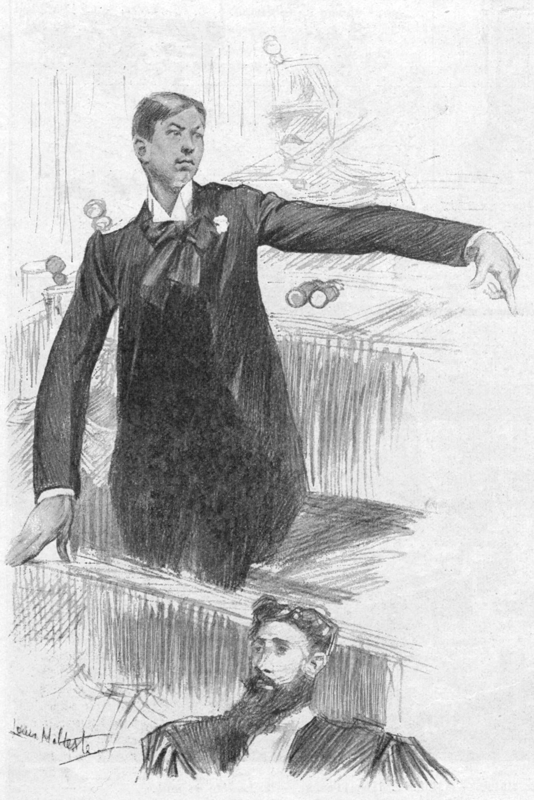 "M. Cailly et Maître Jarre" (procès de la Haute-Cour).